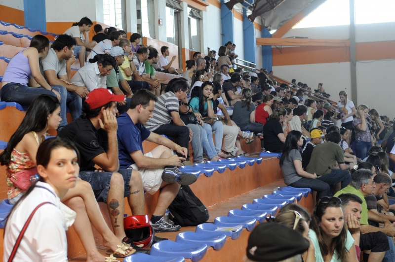 Parentes aguardam no Centro Desportivo Municipal para identificar corpos das vítimas do incêndio na Boate Kiss.